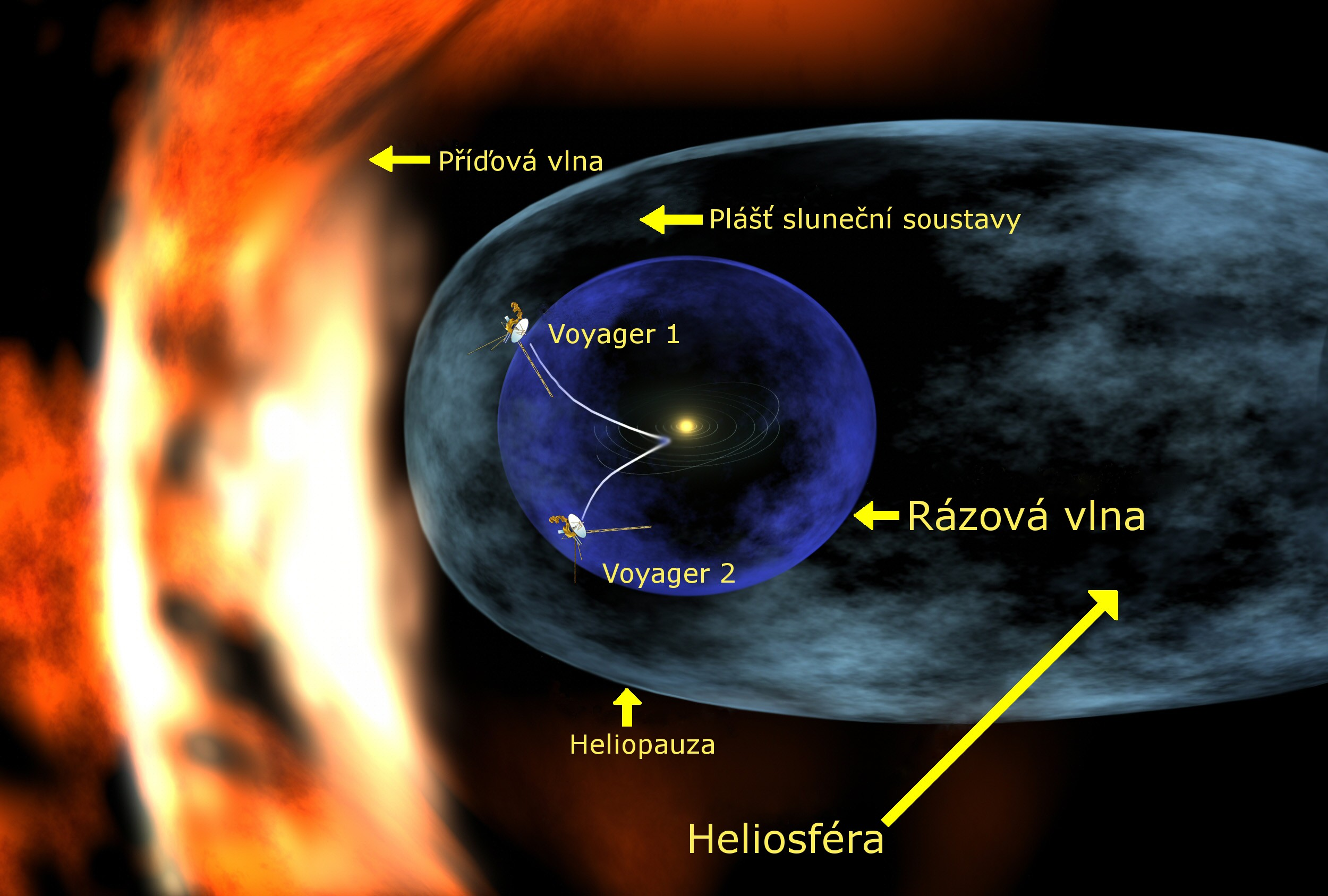 Sondy Voyager 1 a 2 opouštějící sluneční soustavu